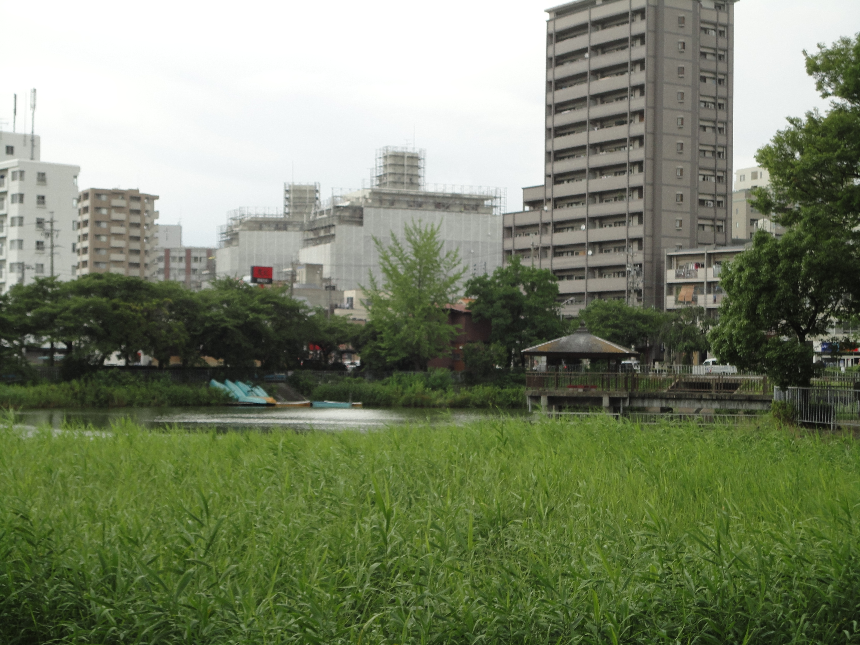 隼人池公園